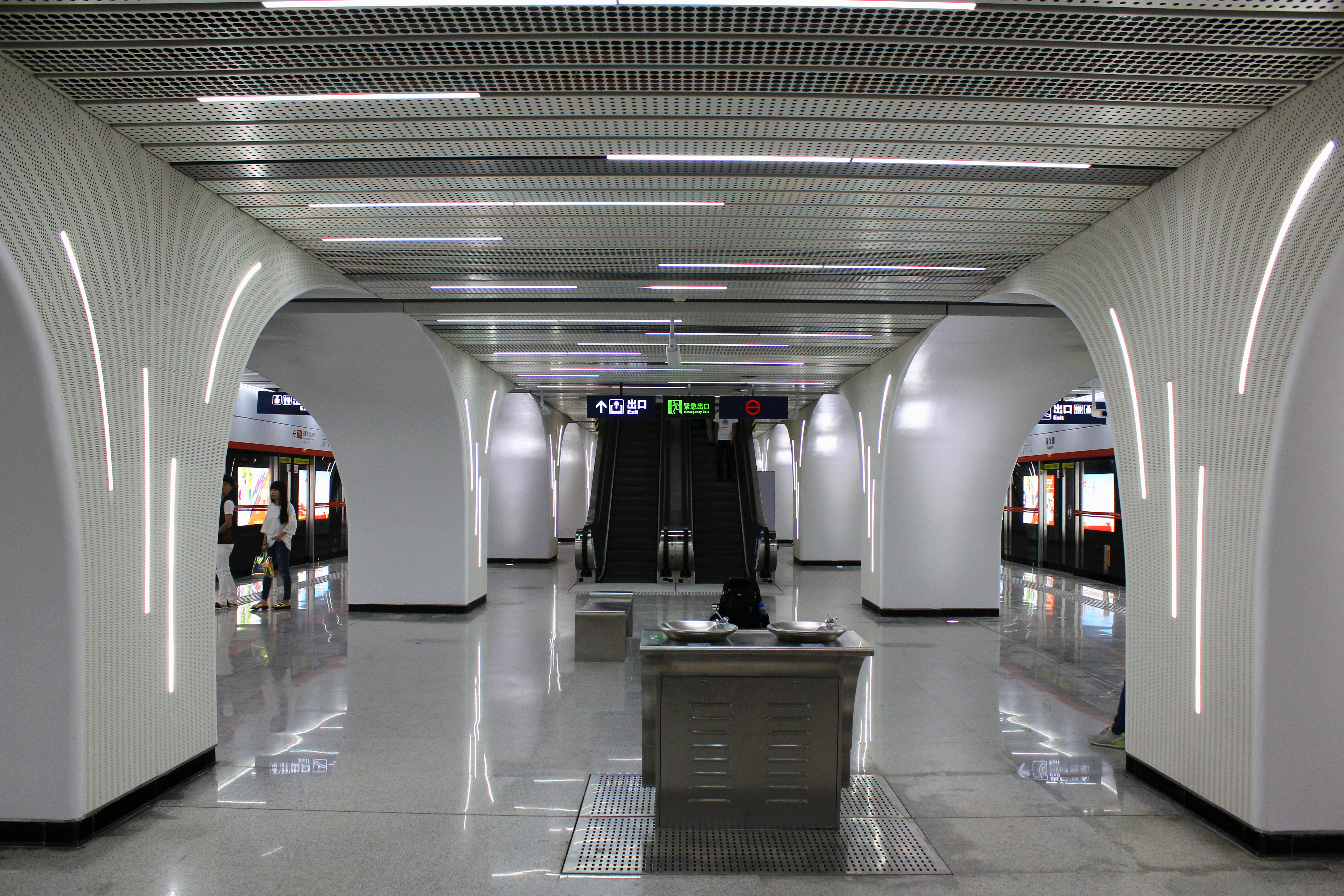 武汉地铁7号线徐家棚站站台